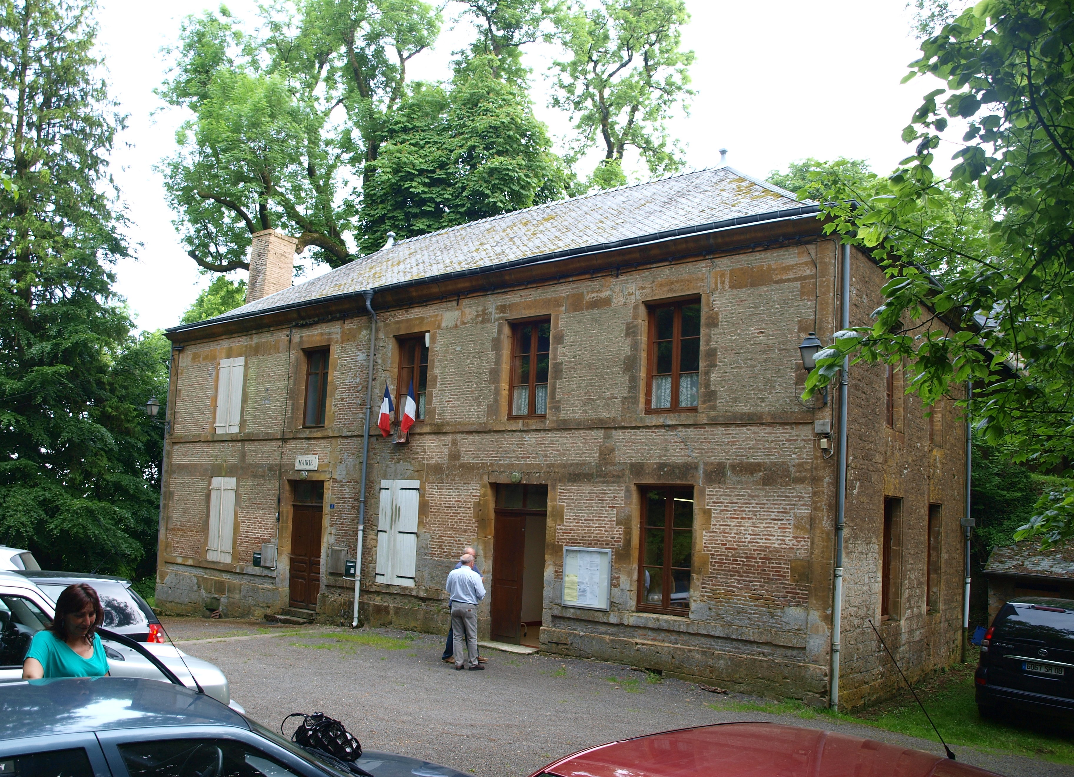 Omont (Ardennes, France) ; la mairie.